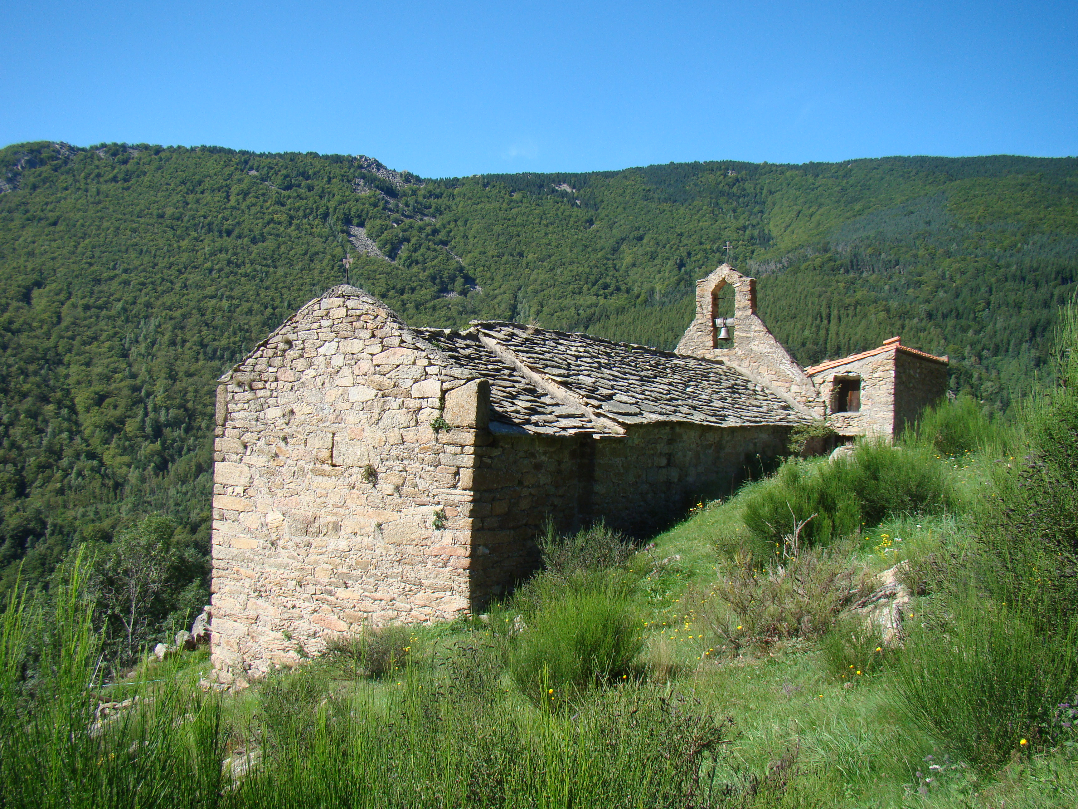 Ermitage Saint-Guilhem de Combret - vue du nord est